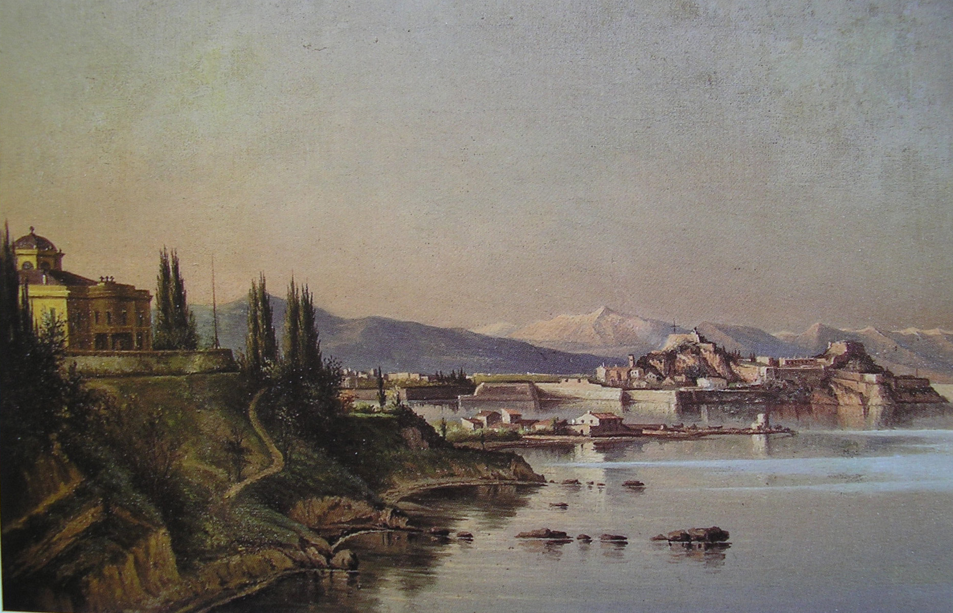 Landscape in Kerkyra